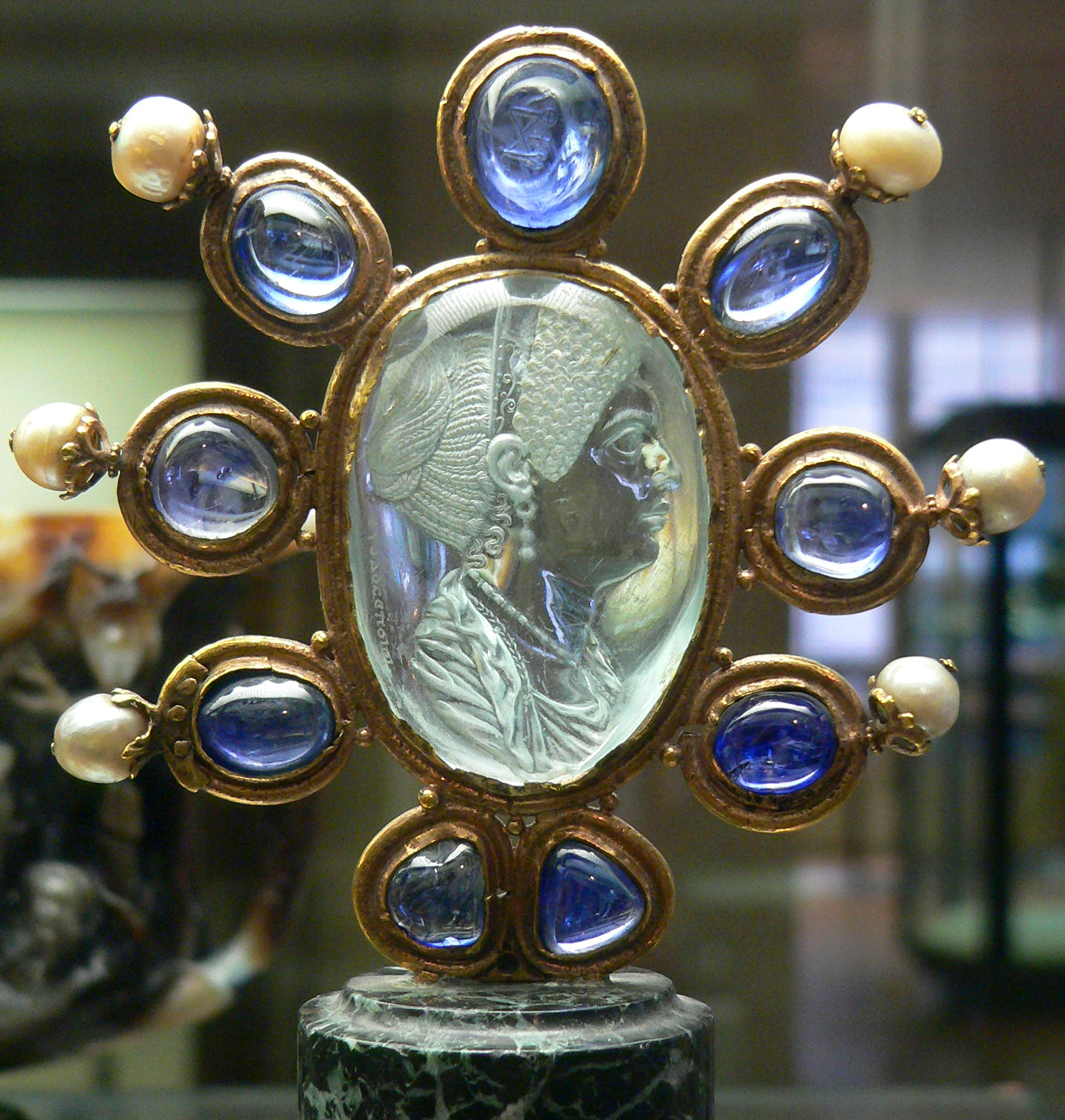 Intaille représentant Julie, fille de Titus. Sommet de "l'escrain de Charlemagne" (monture du IXe siècle). Auteurs: Euodos (graveur); Atelier de la cour de Charles le Chauve (orfèvre). Cette intaille a appartenu au Trésor de Saint-Denis. Acquisition en 1791 - Le texte en grec, gravé à gauche sur l'intaille, dit : ΕΥΟΔΟΣ (ΕΥΟΔΟC) ΕΠΟΙΕΙ (EUODOS EPOIEI); ἐποίει est la 3ième personne du sing. du imparfait de ποιέειν - faire) : Euodos (le) faisait (avait fait)